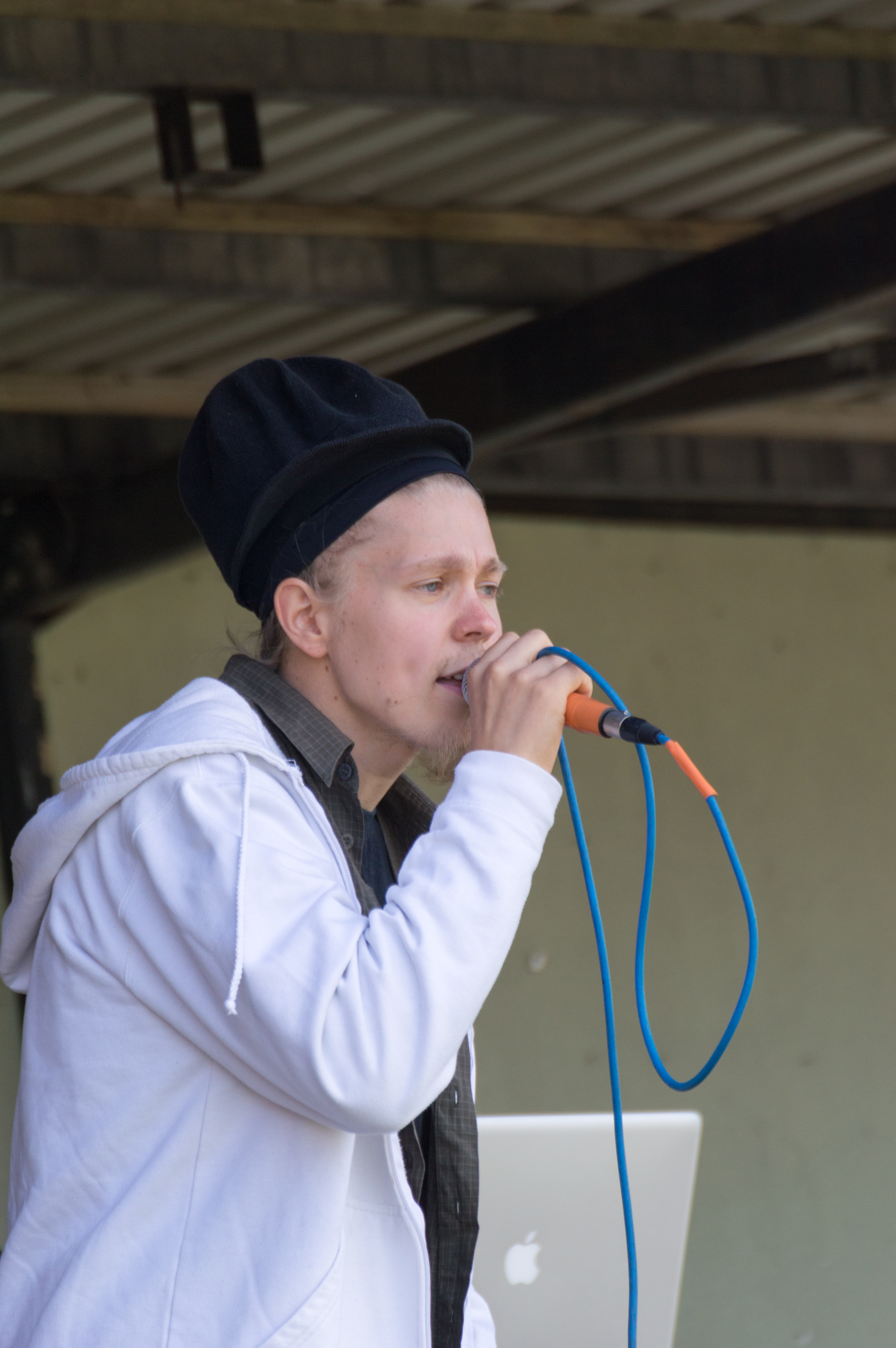 Salomo suomalainen reggaeartisti